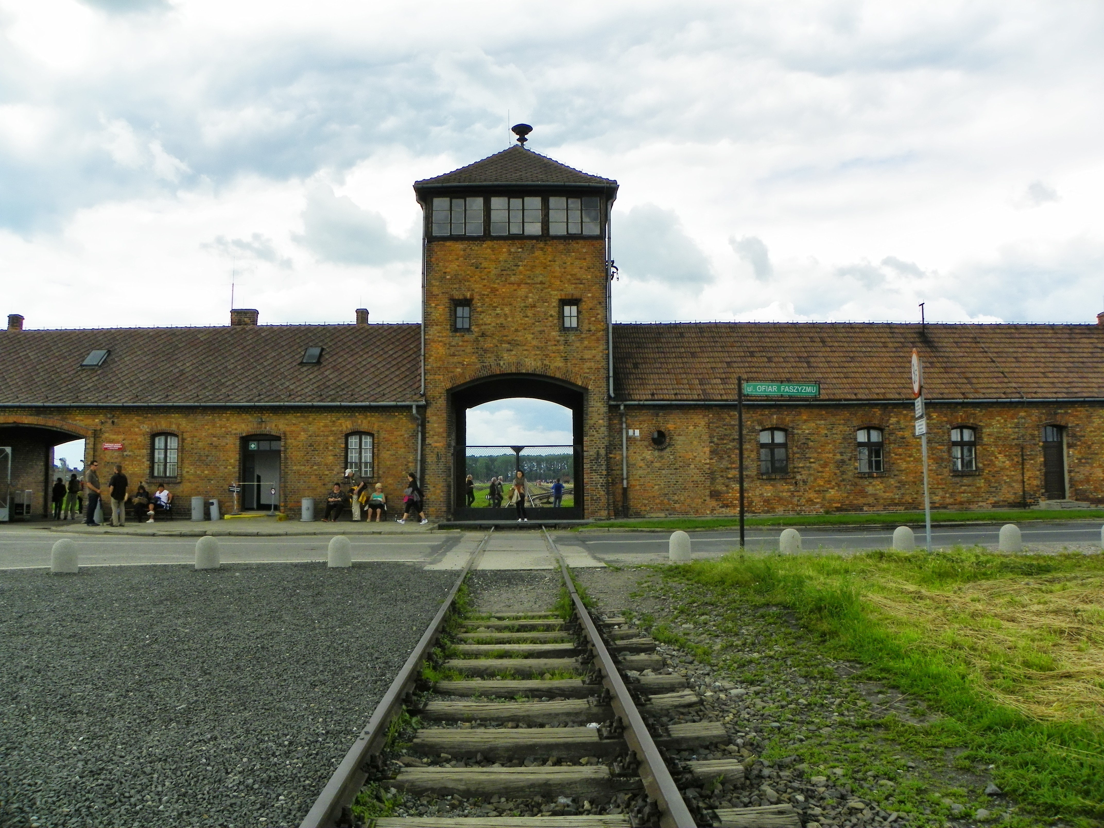 Auschwitz II-Birkenau (German death camp), Oświęcim, Poland